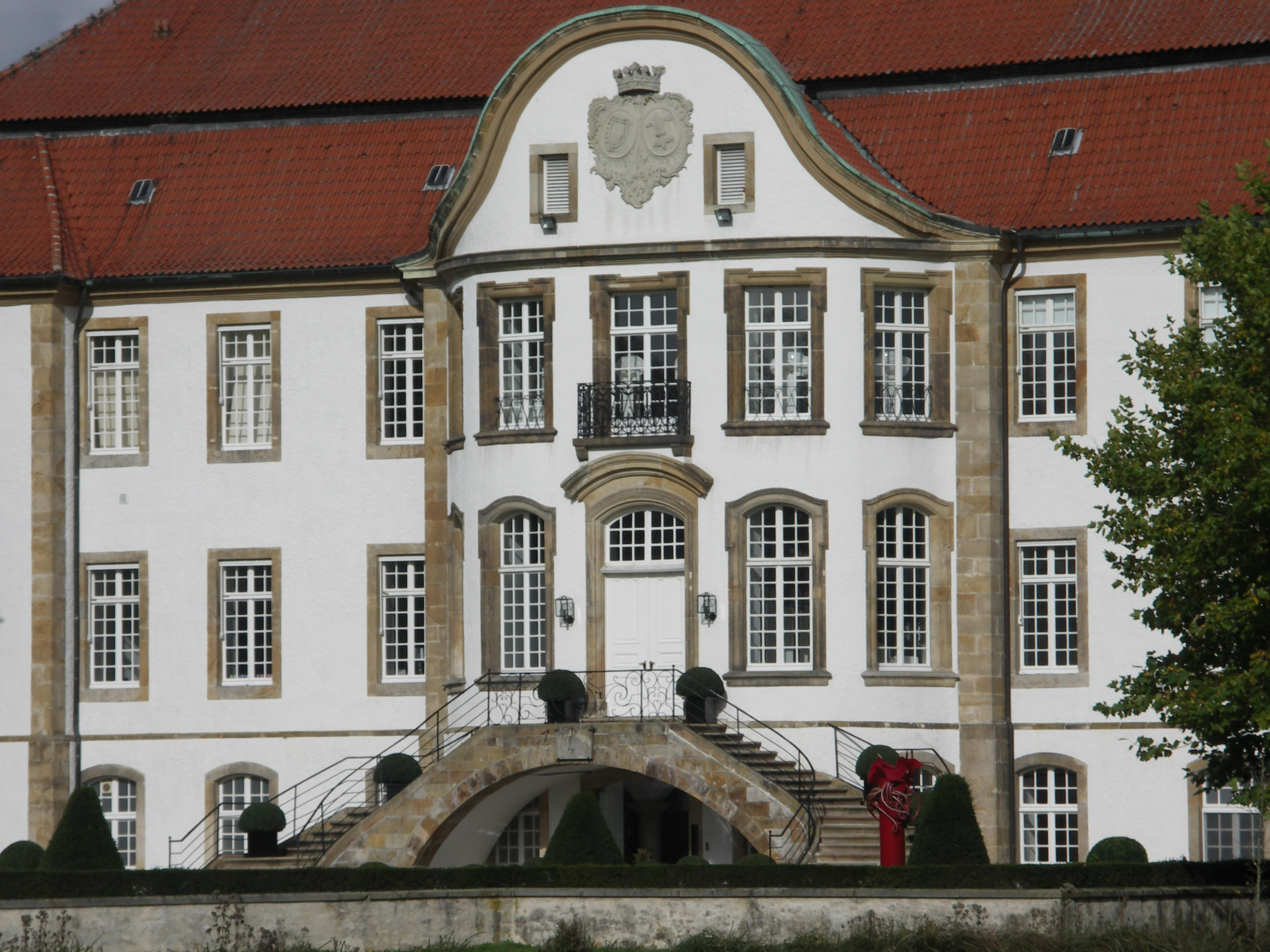 Schloß Harkotten near Sassenberg, Germany